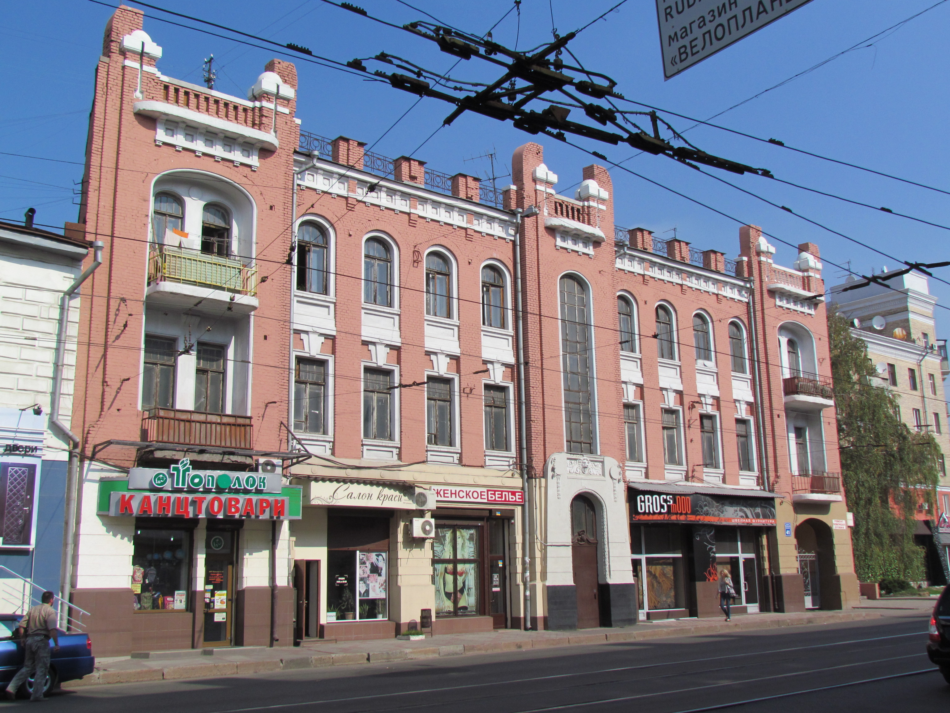 Україна, Харків, пр. Московський, 41